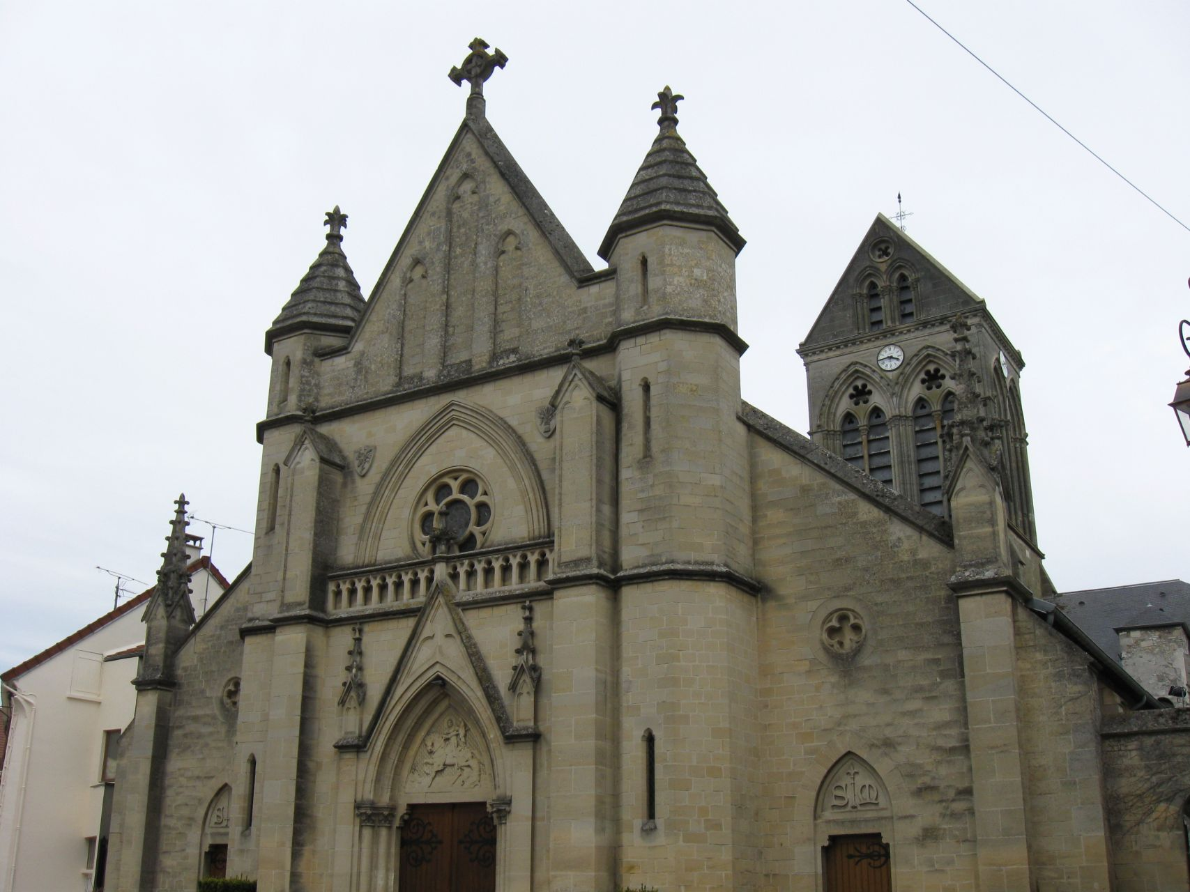 L'église Saint Martin de Charly-sur-Marne (Aisne , région Picardie)